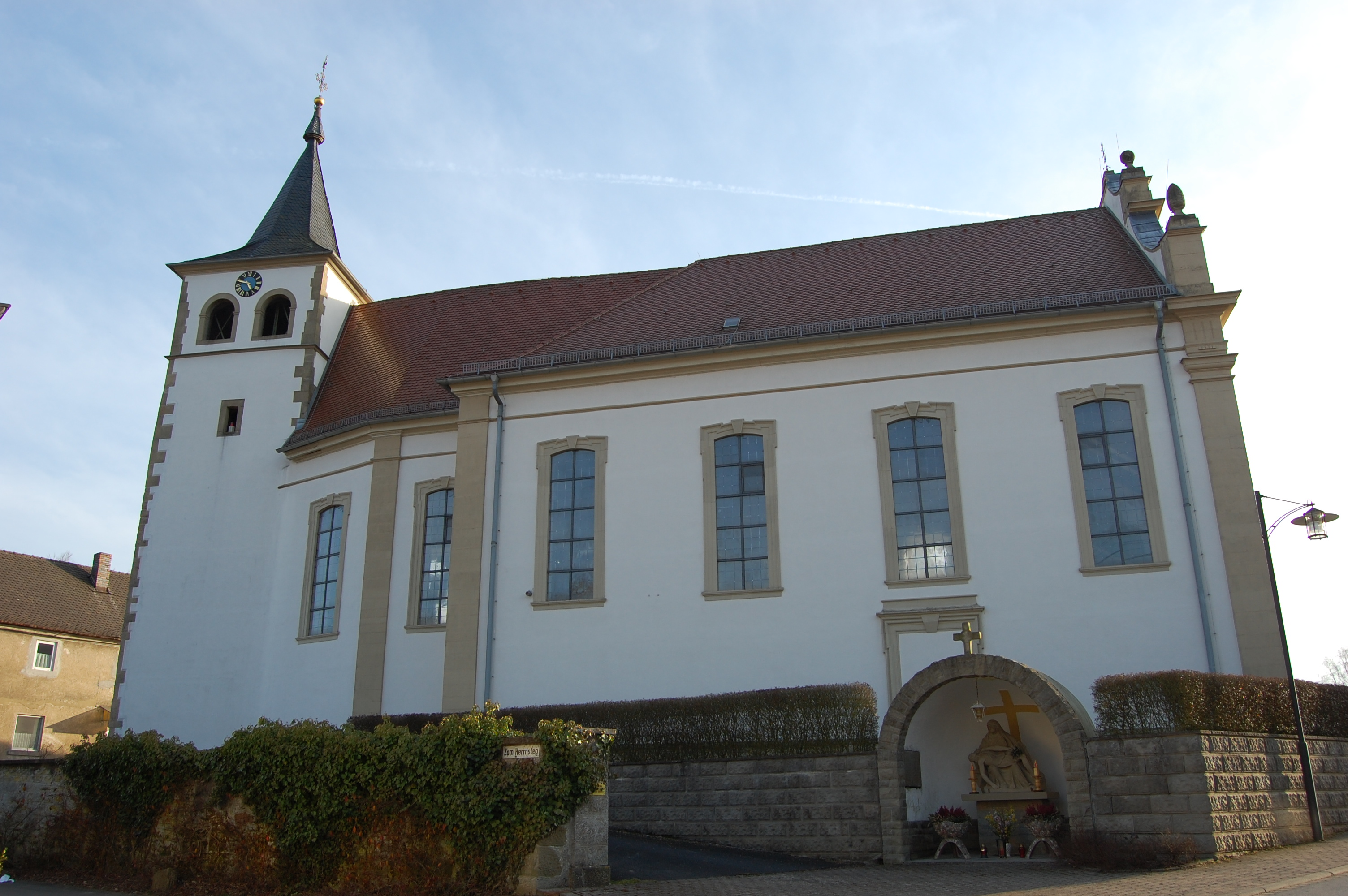 Kirche Mariä Himmelfahrt, Fridritt, Stadt Münnerstadt, Kreis Bad Kissingen (2011)